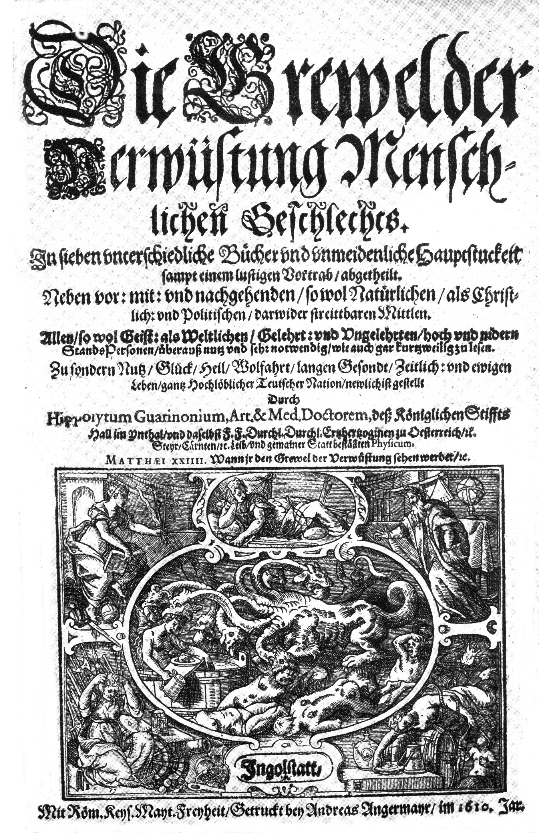 Titelblatt der Grewel der Verwüstung menschlichen Geschlechts von Hippolytus Guarinonius